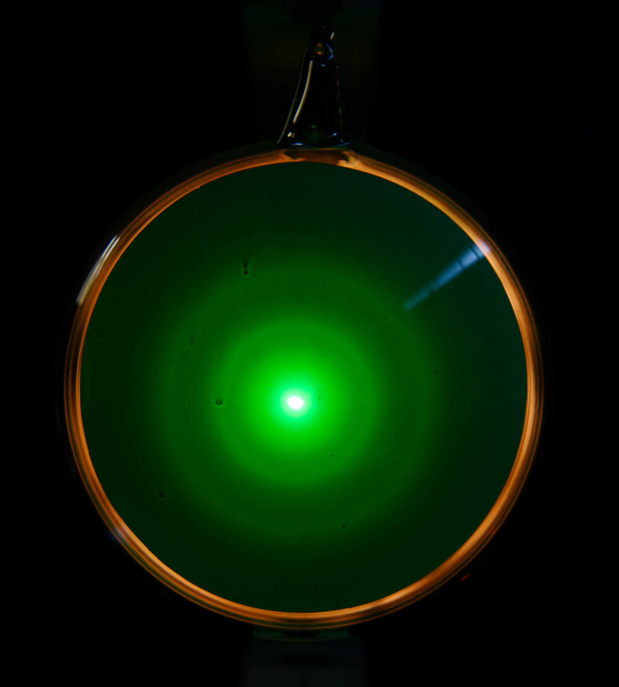 Elektronenbeugung